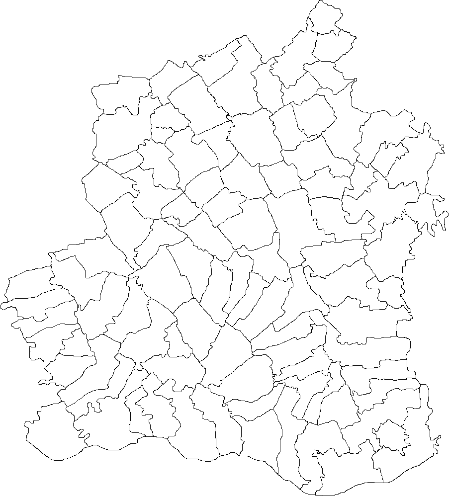 Categorie:Hărţi ale judeţului Teleorman